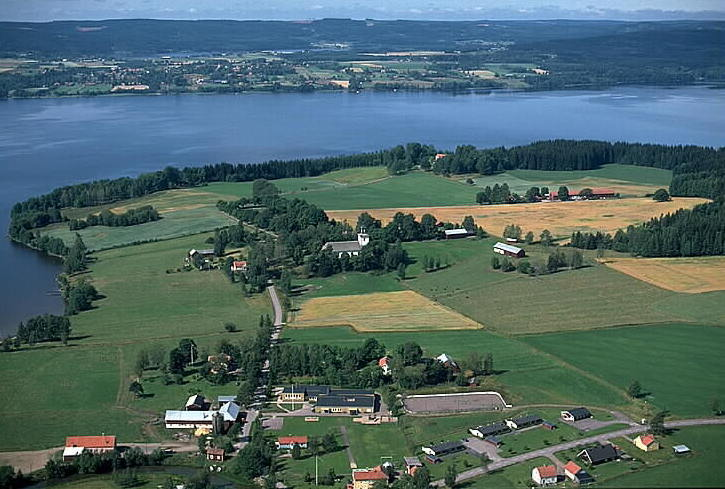 Östra Ämterviks kyrka i bildens mitt. Motiv: Östra Ämtervik Nyckelord: Flygbilder, Riksintressen Kategori: Kyrkby Östra Ämterviks kyrka i bildens mitt.